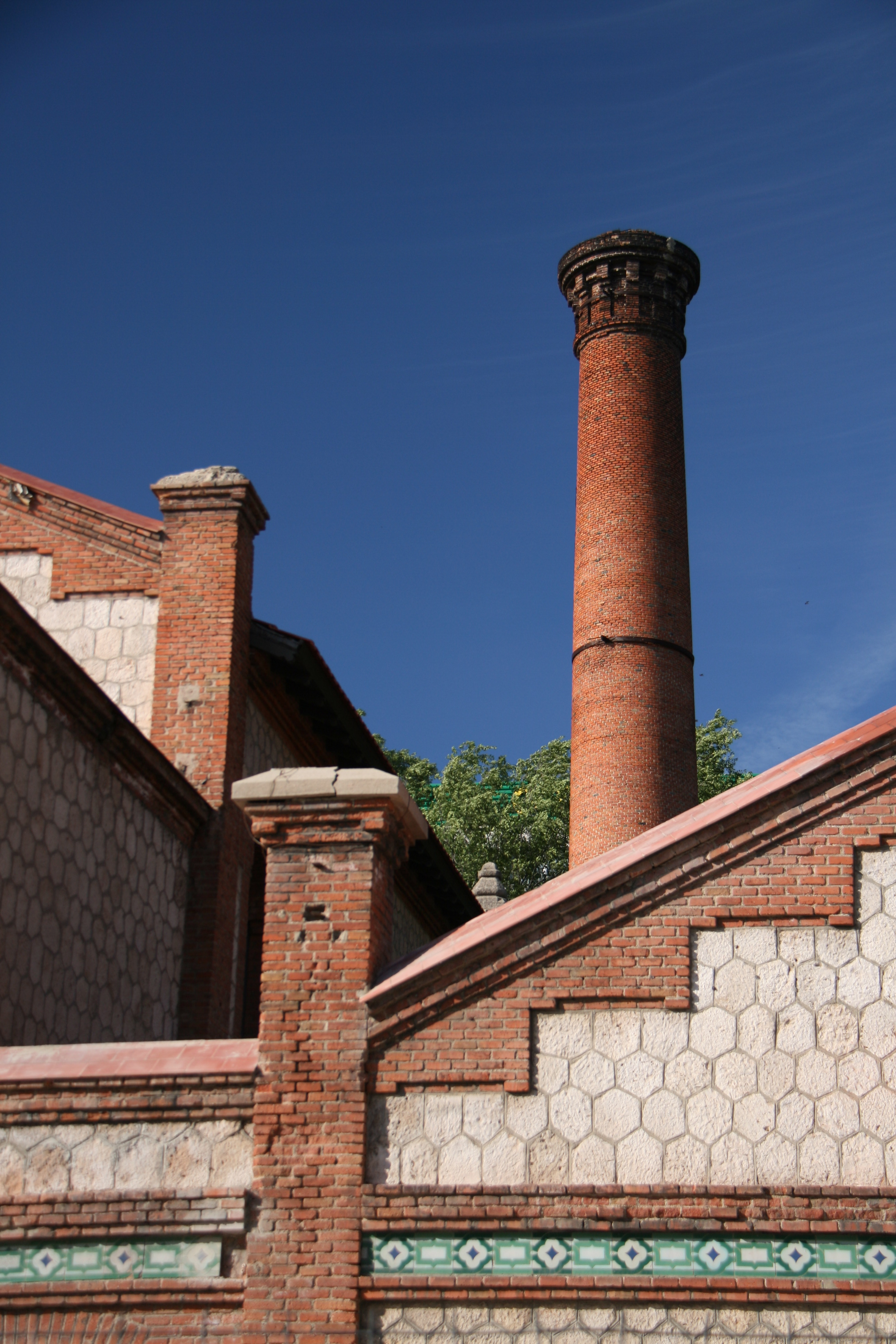 Chemenea del Matadero de Arganzuela